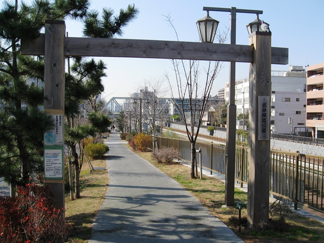 北砂緑道公園